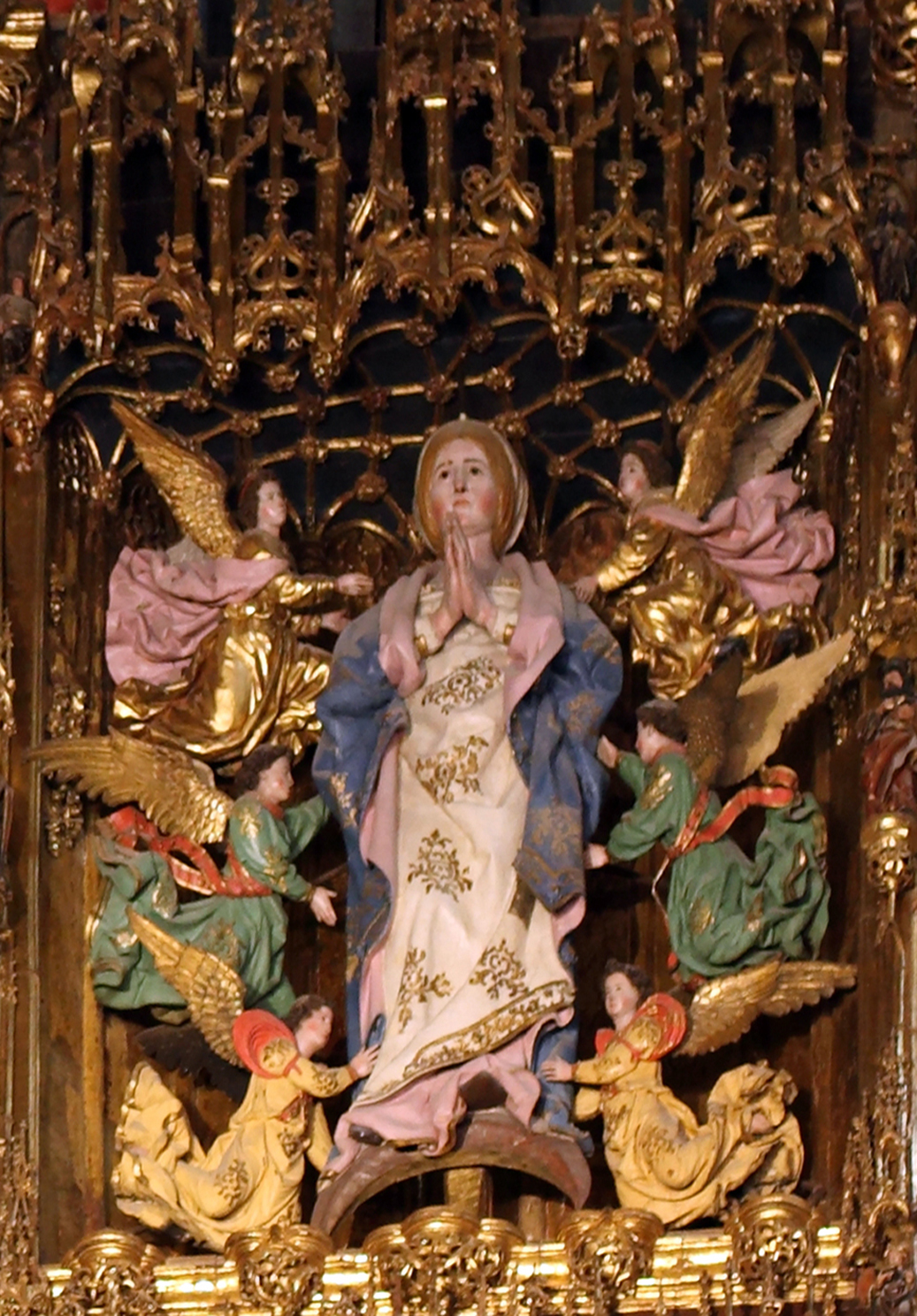 Detalle de la Asunción del retablo mayor de la catedral de Toledo (España)